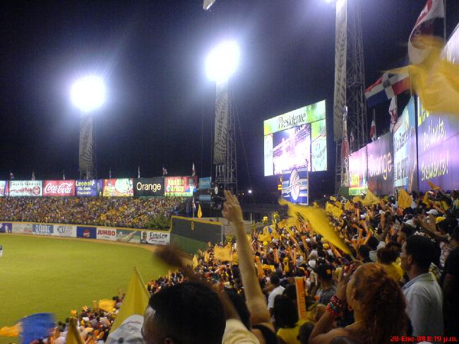 Vista desde los bleachers del right field hacia la pantalla del Estadio Cibao